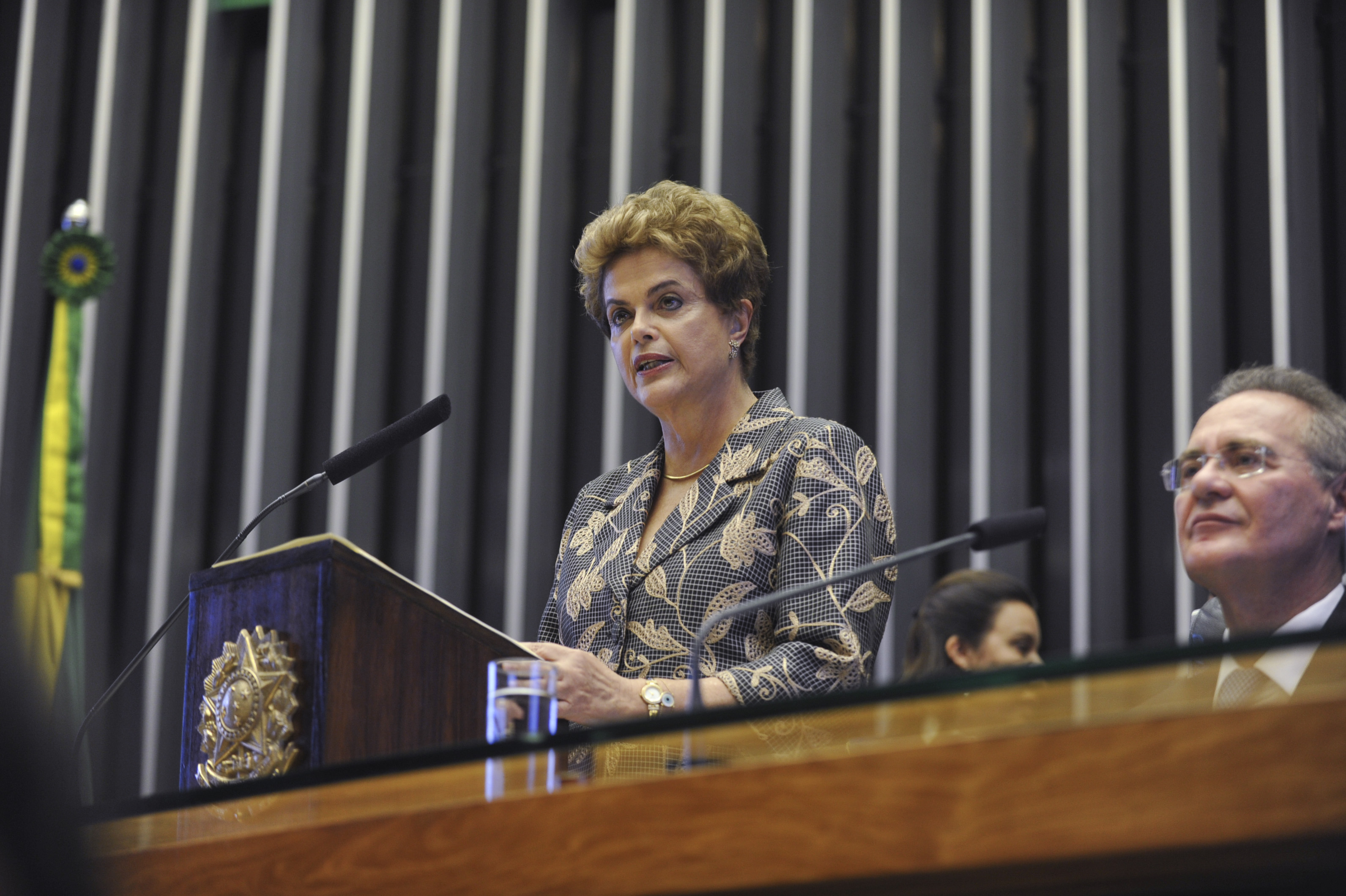 Plenário da Câmara dos Deputados durante sessão solene do Congresso Nacional destinada a inaugurar a 2ª Sessão Legislativa Ordinária da 55ª Legislatura. Mesa: presidente da República, Dilma Rousseff; presidente do Congresso Nacional, senador Renan Calheiros (PMDB-AL). Foto: Jane de Araújo/Agência Senado